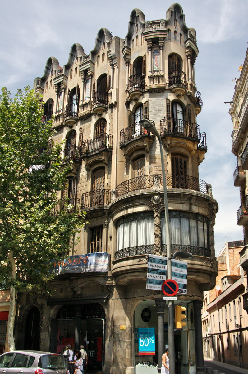 Casa de Jaume Estrada al c/ de Sants, 54 (Barcelona, Catalunya), obra de 1906 de Modest Feu i Estrada (1870-1933)